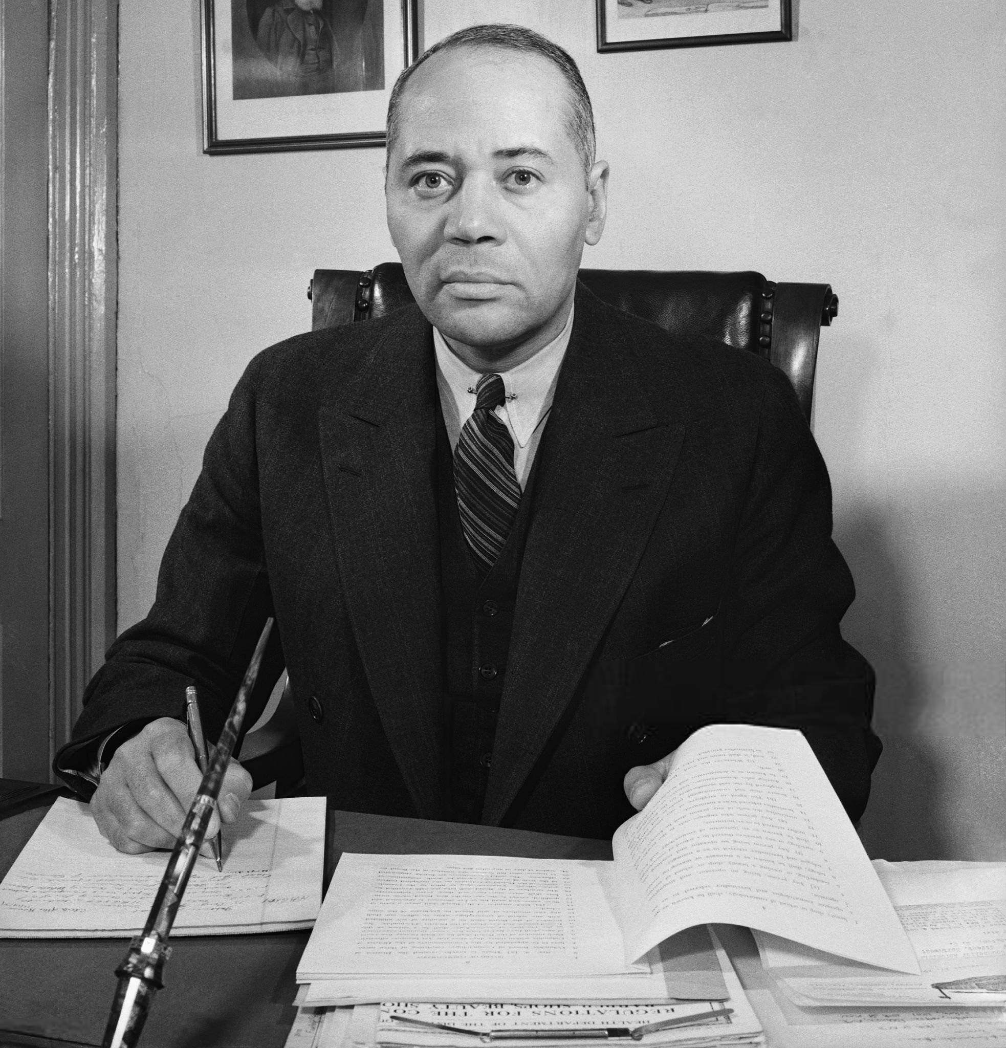 Charles Hamilton Houston en 1940